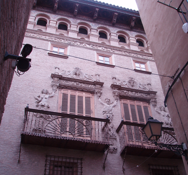 La Casa del Almirante (Tudela), en 2007